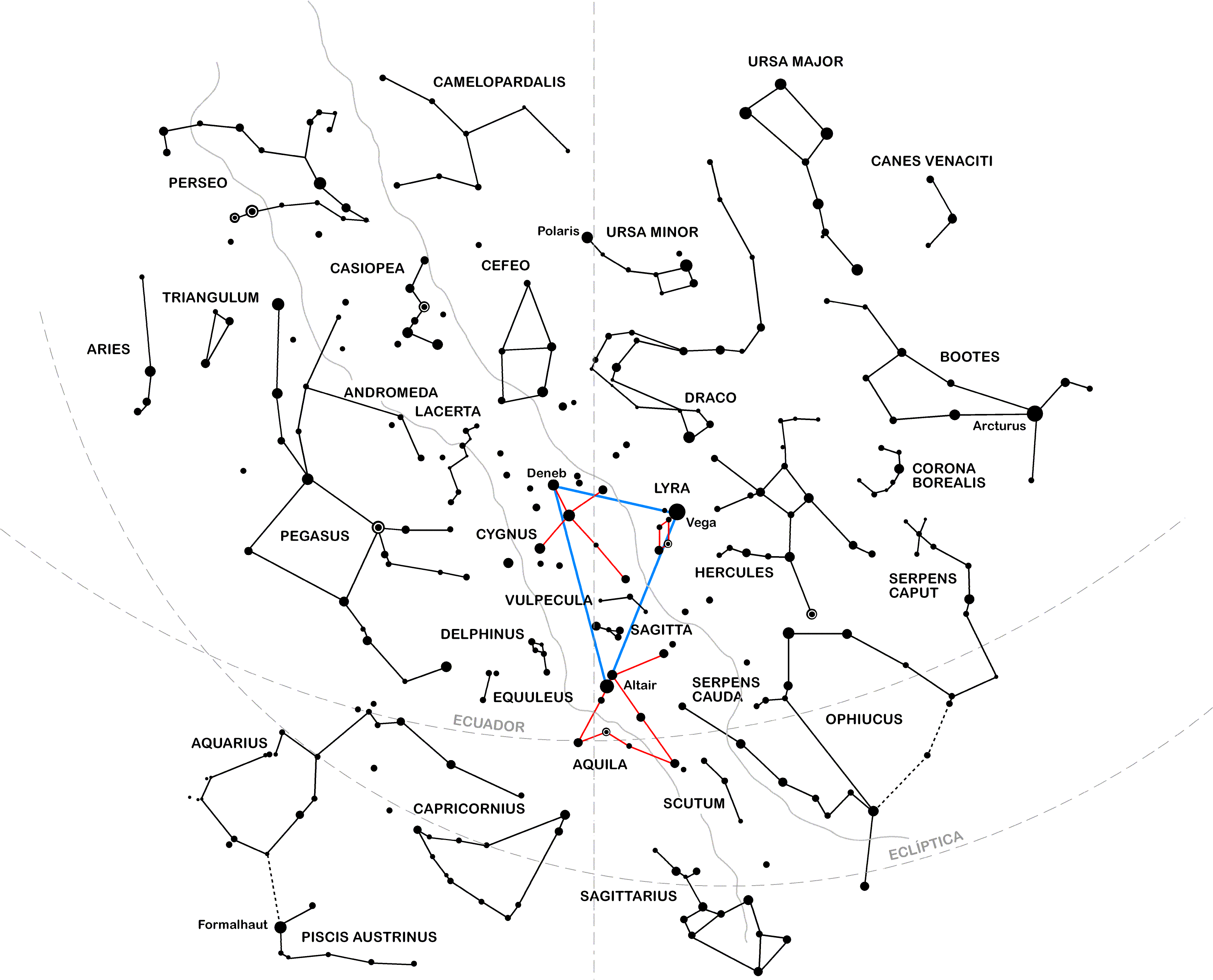 Representación del Triángulo de verano y gran parte del firmamento del hemisferio norte en agosto.